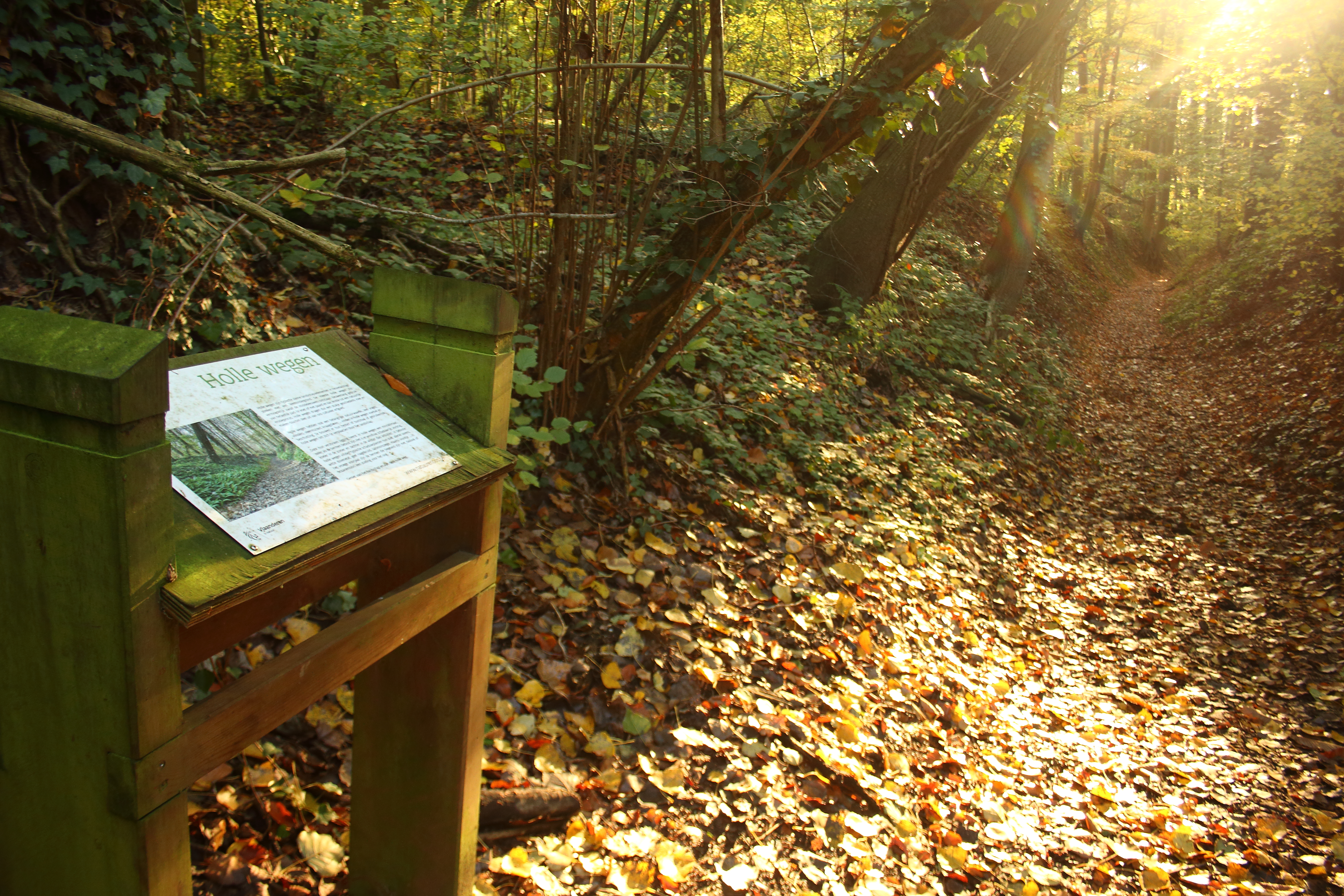 Neigembos, Ninove, Vlaanderen, België